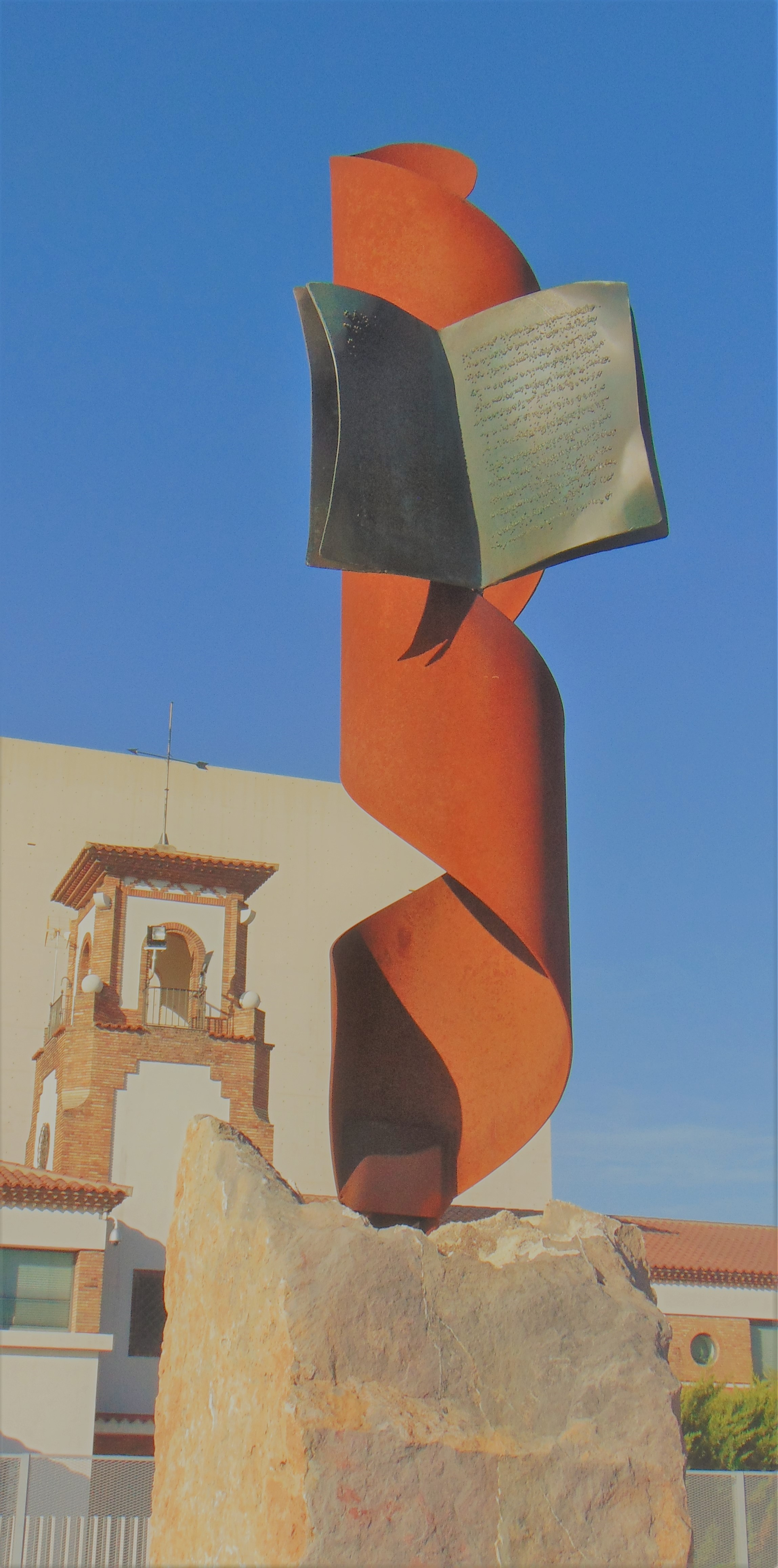 Escultura de El Periódico de Aragón (2015).